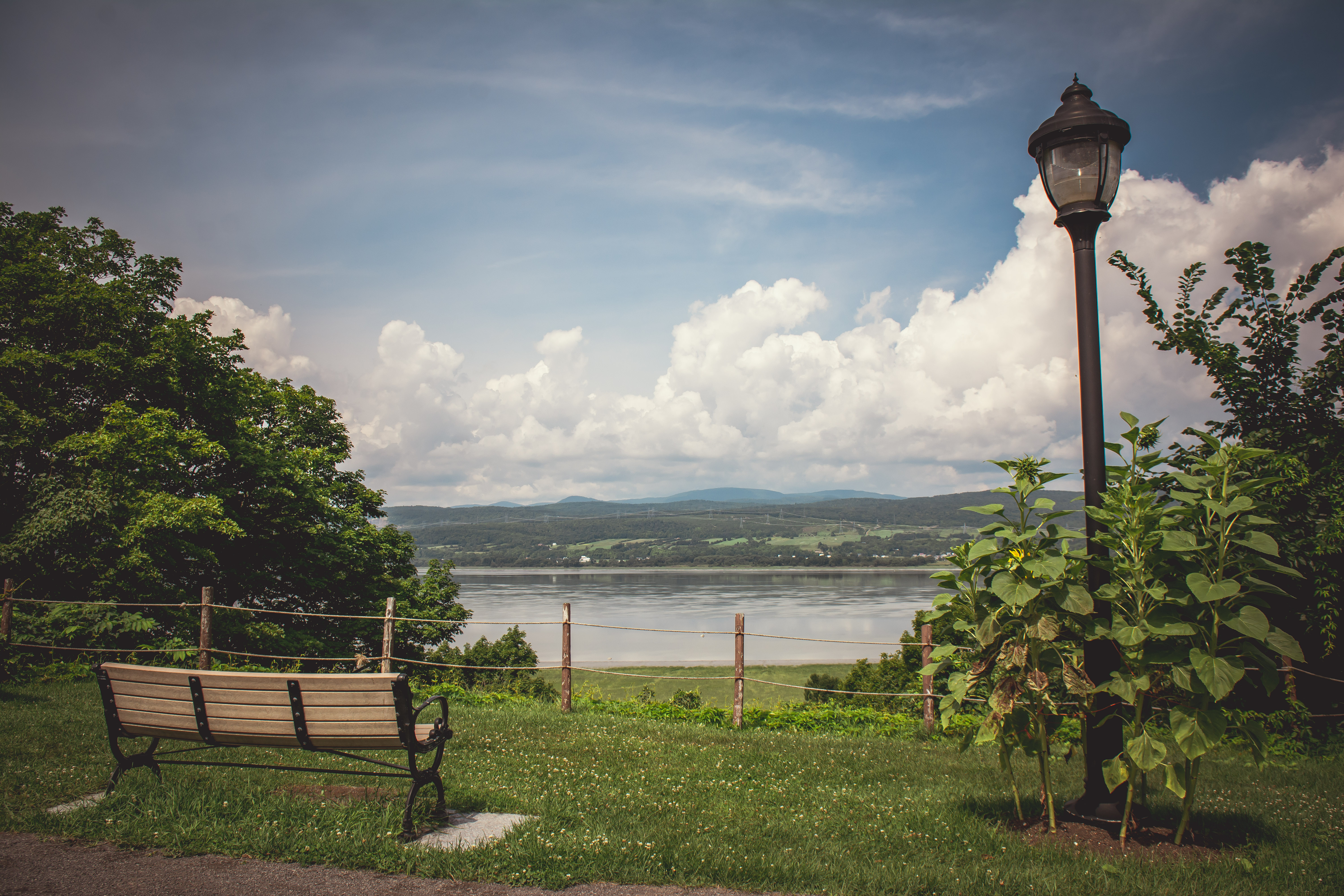 crédit photo: Sébastien Girard